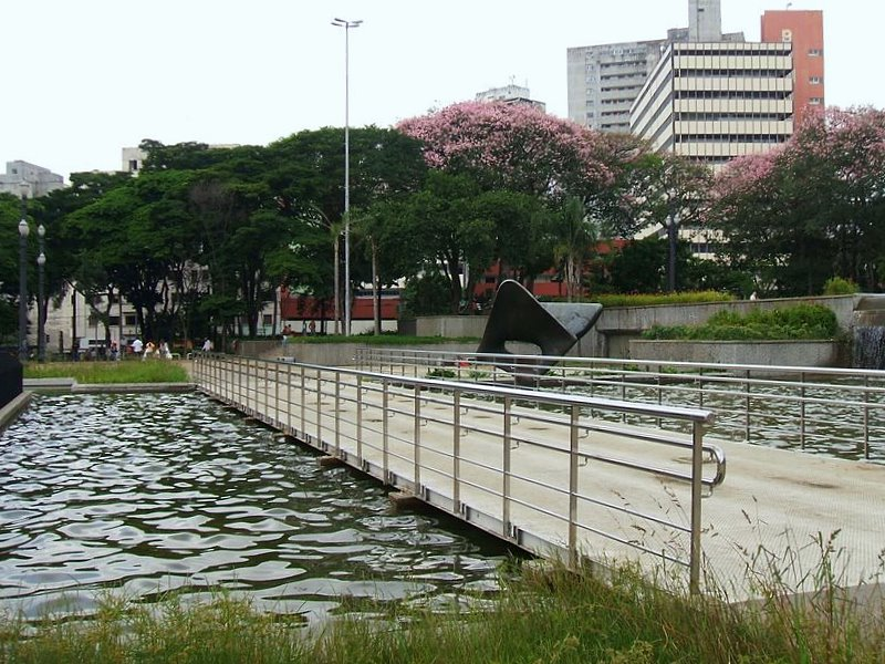 Passarela sobre as fontes da Praça da Sé, em São Paulo, Brasil.